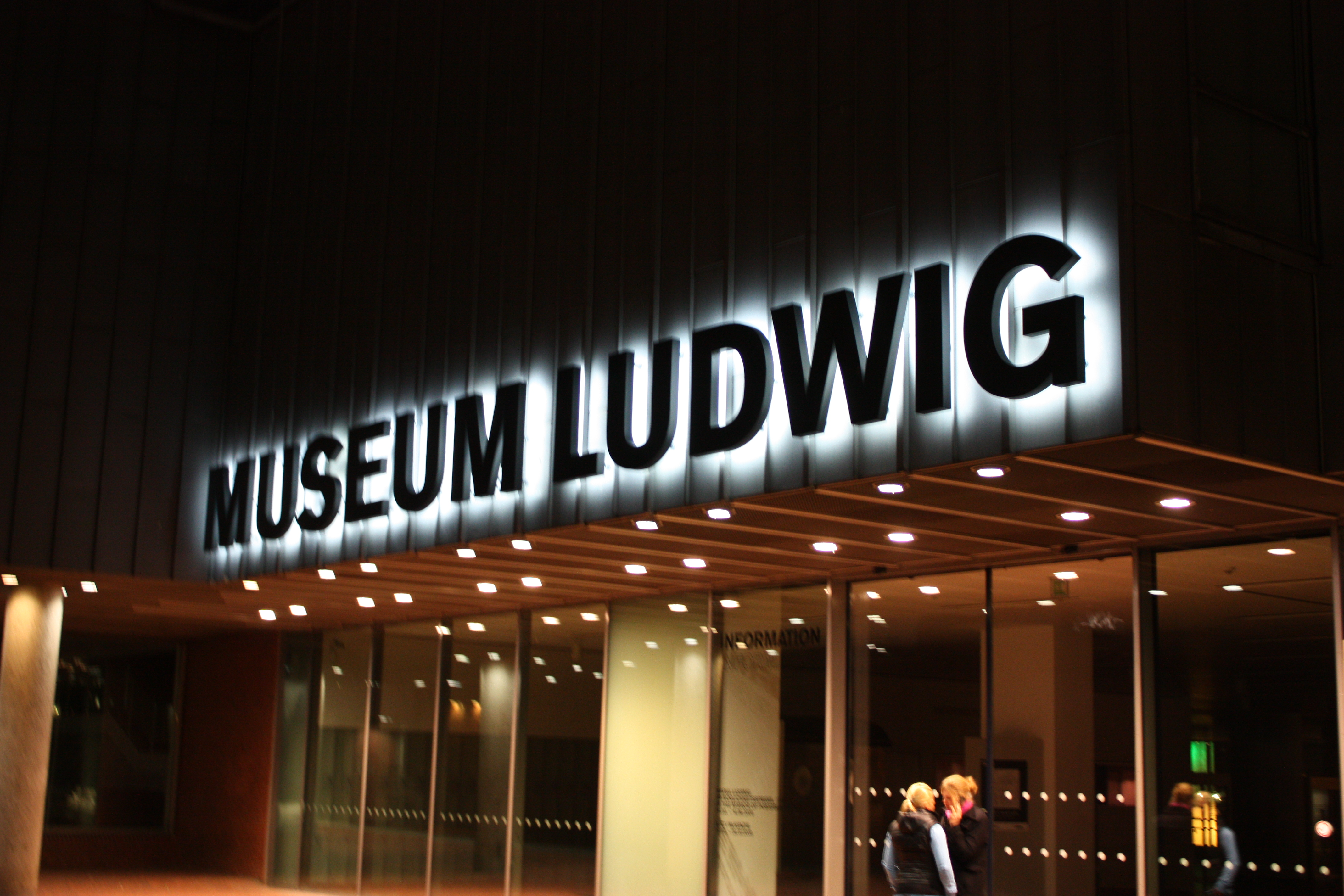 Köln, März 2009